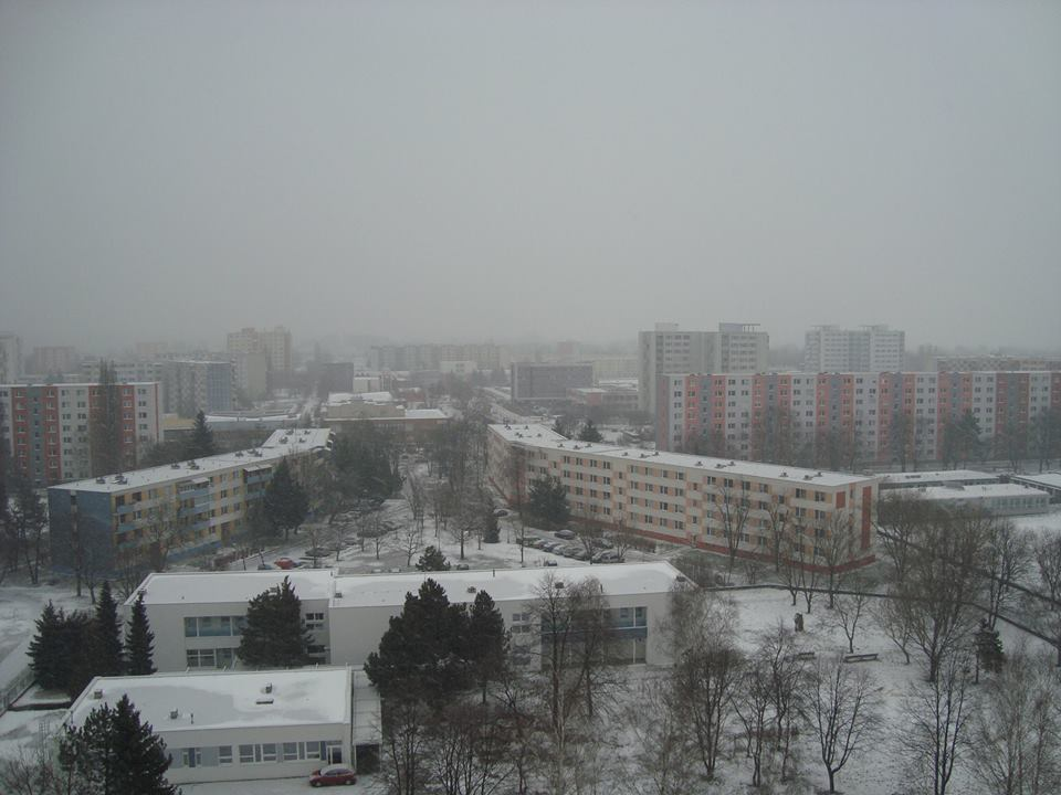 Chrenova v zime